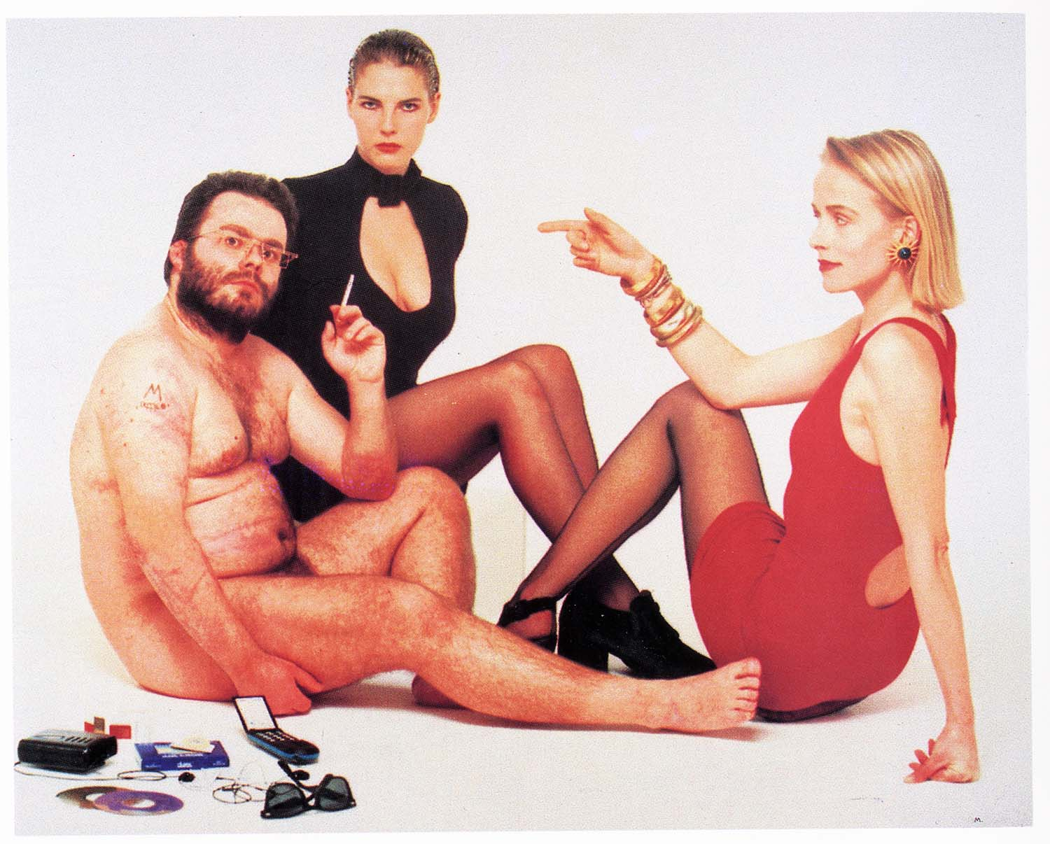 Exposition collective les déjeuners sur l'herbe